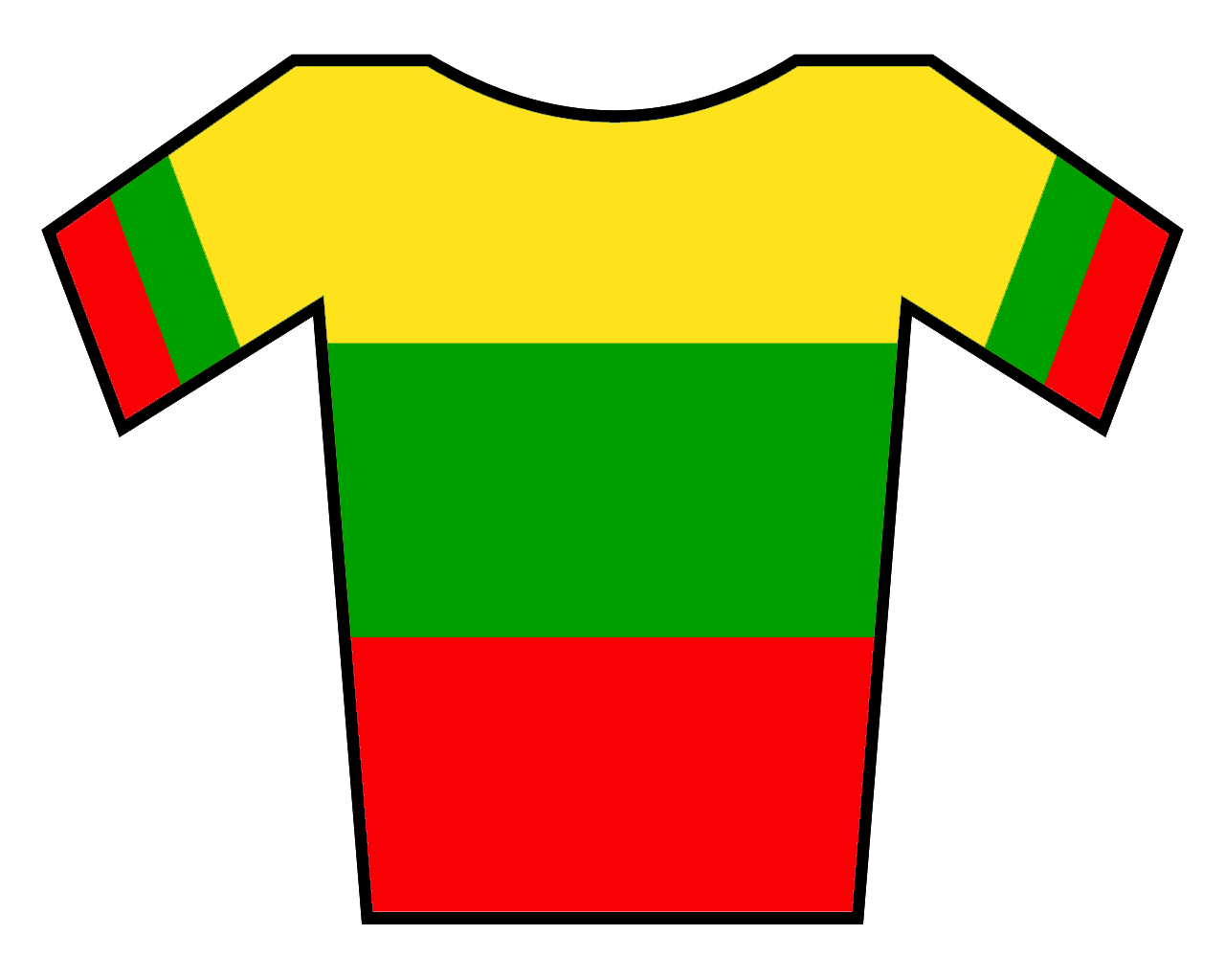 MAillot de Lituania